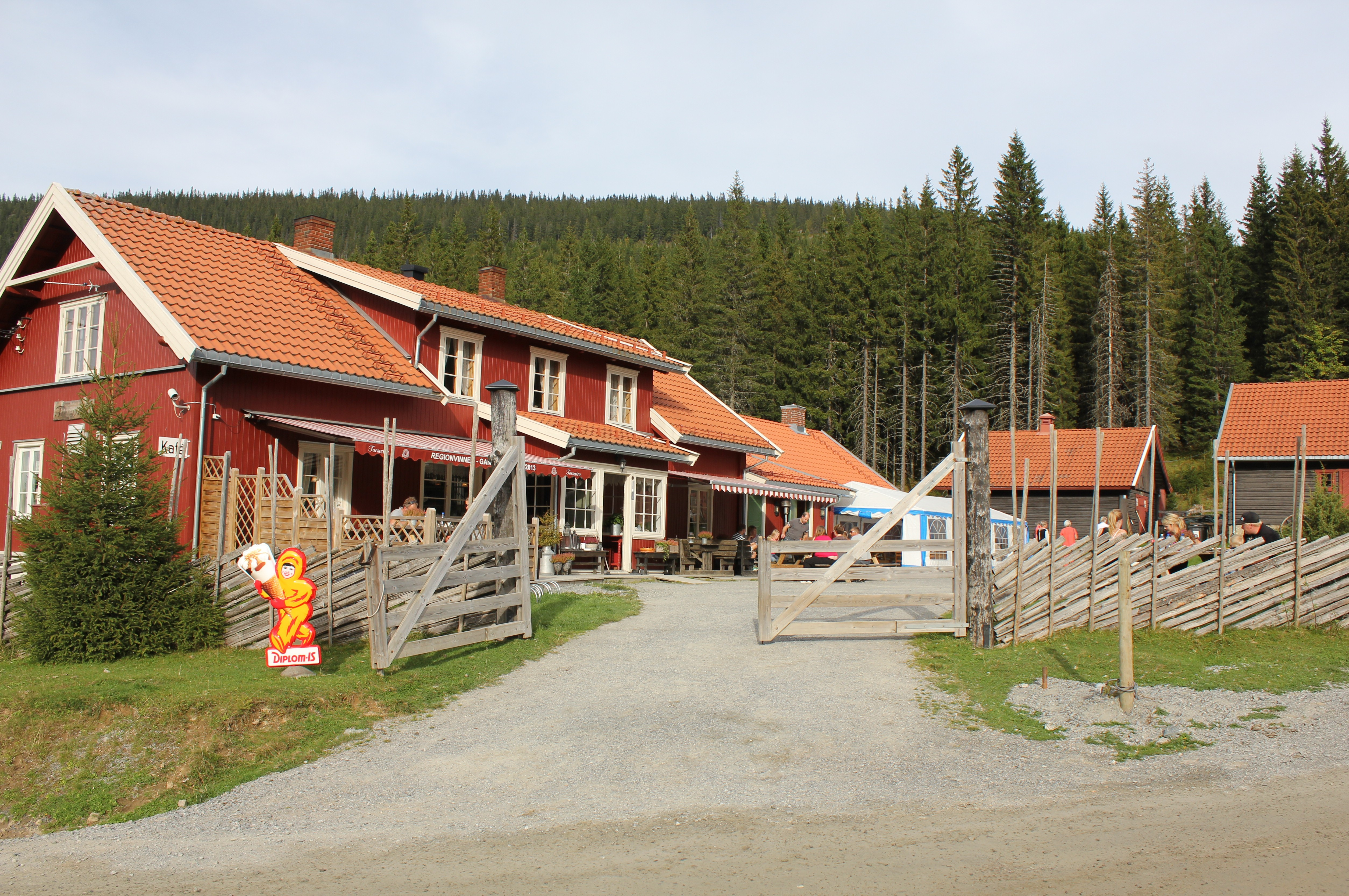 Torsætra gjestgiveri og spisested på Totenåsen.